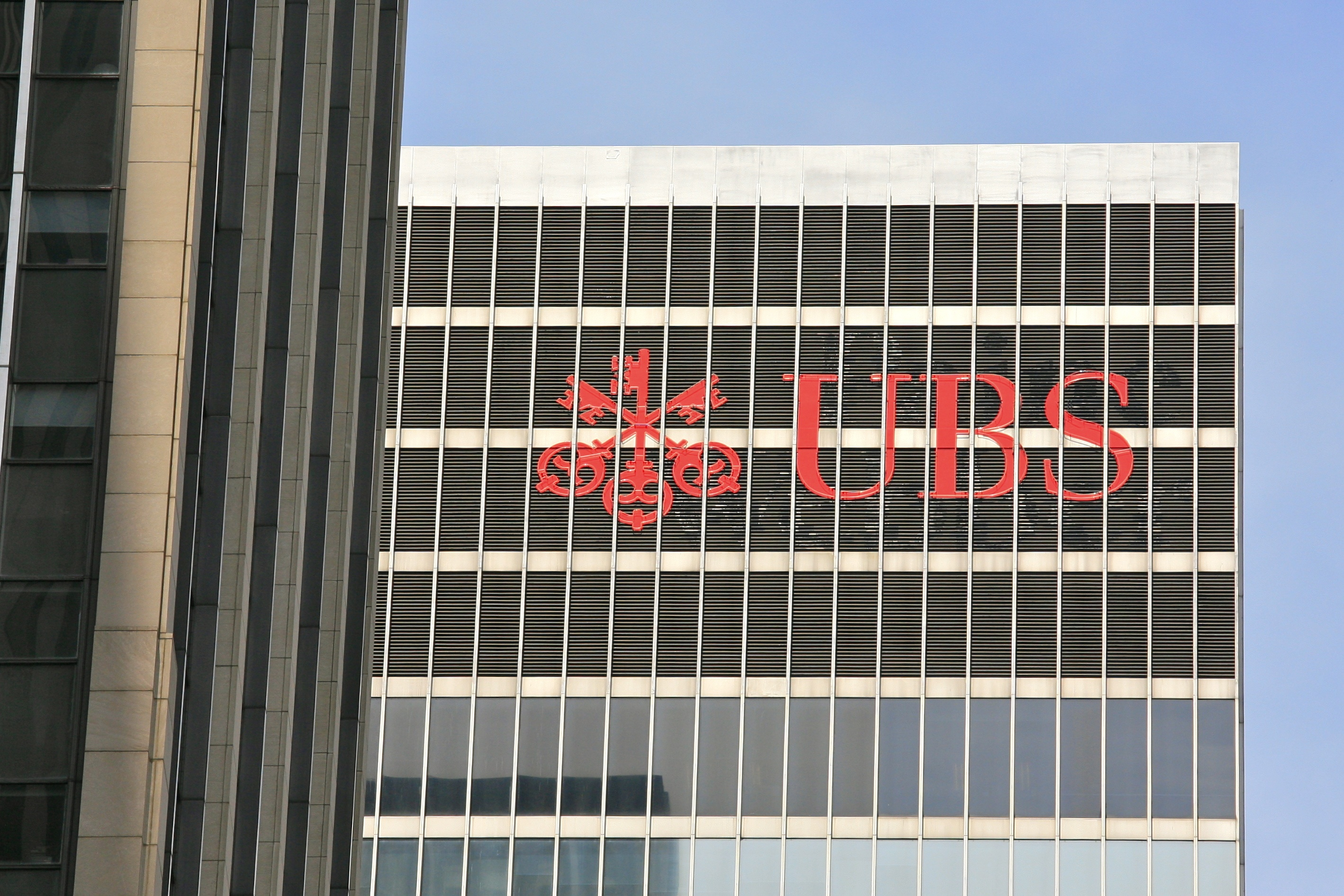 UBS Logo